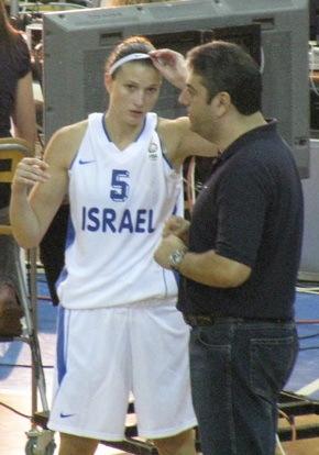 מירב דורי ואלי רבי